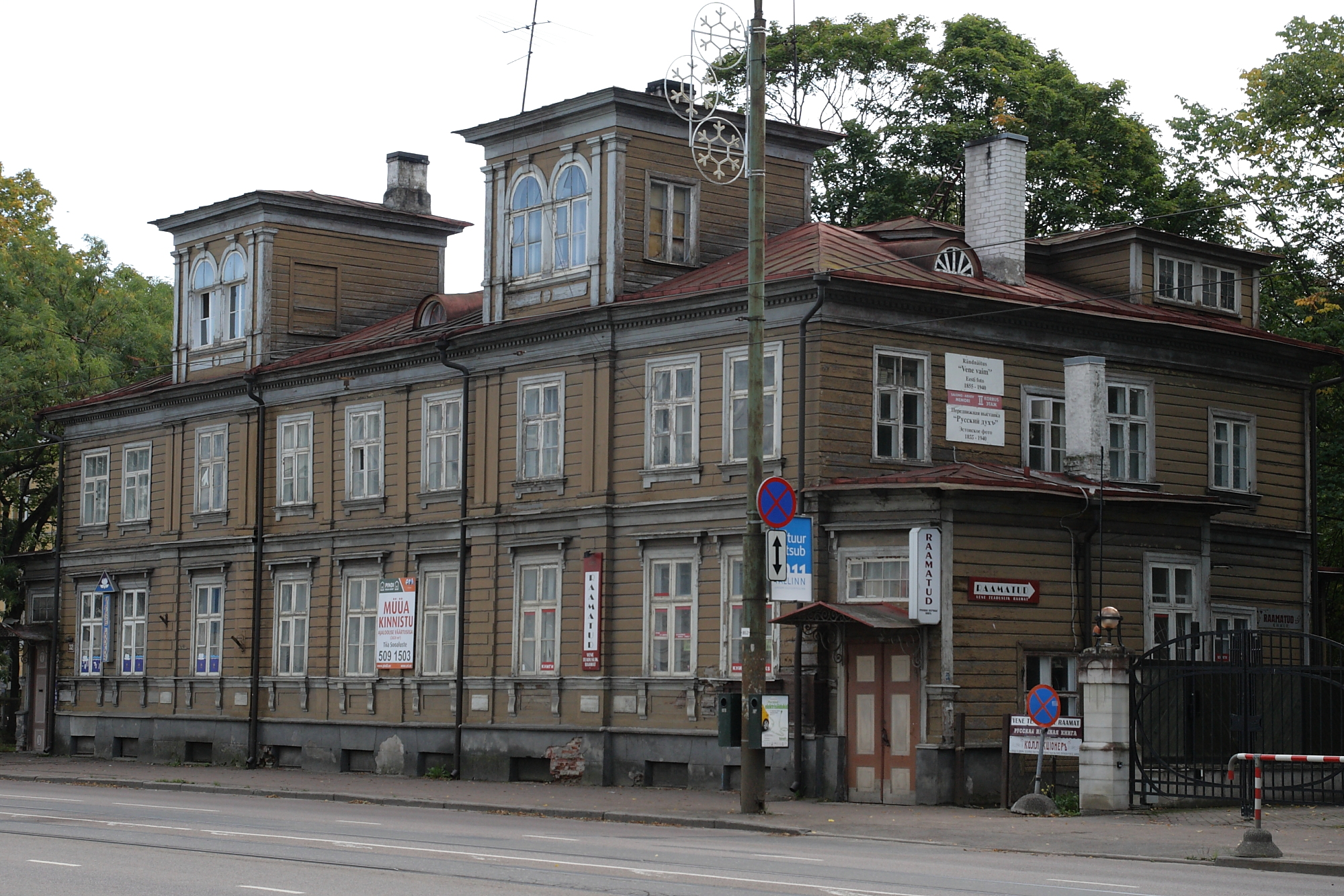 Tallinn elamu Narva mnt 32, 19.-20. saj vahetus